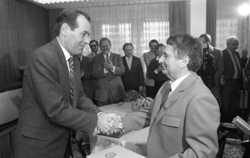 ADN-ZB Franke 21.12.81 Berlin: Anläßlich seines 60. Geburtstages erhielt Heinz Adameck, Mitglied des ZK der SED und Vorsitzender des Staatlichen Komitees für Fernsehen (r.), die Ehrenspange zum Vaterländischen Verdienstorden in Gold. Die Auszeichnung überreichte das Mitglied des Politbüros und Sekretär des ZK der SED Joachim Herrmann. Z 1221/ 303 N